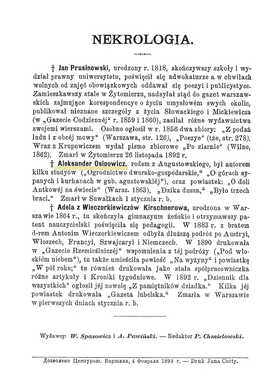 Nekrolog Aleksandra Osipowicza opublikowany w 1893 r. na łamach czasopisma "Ateneum".